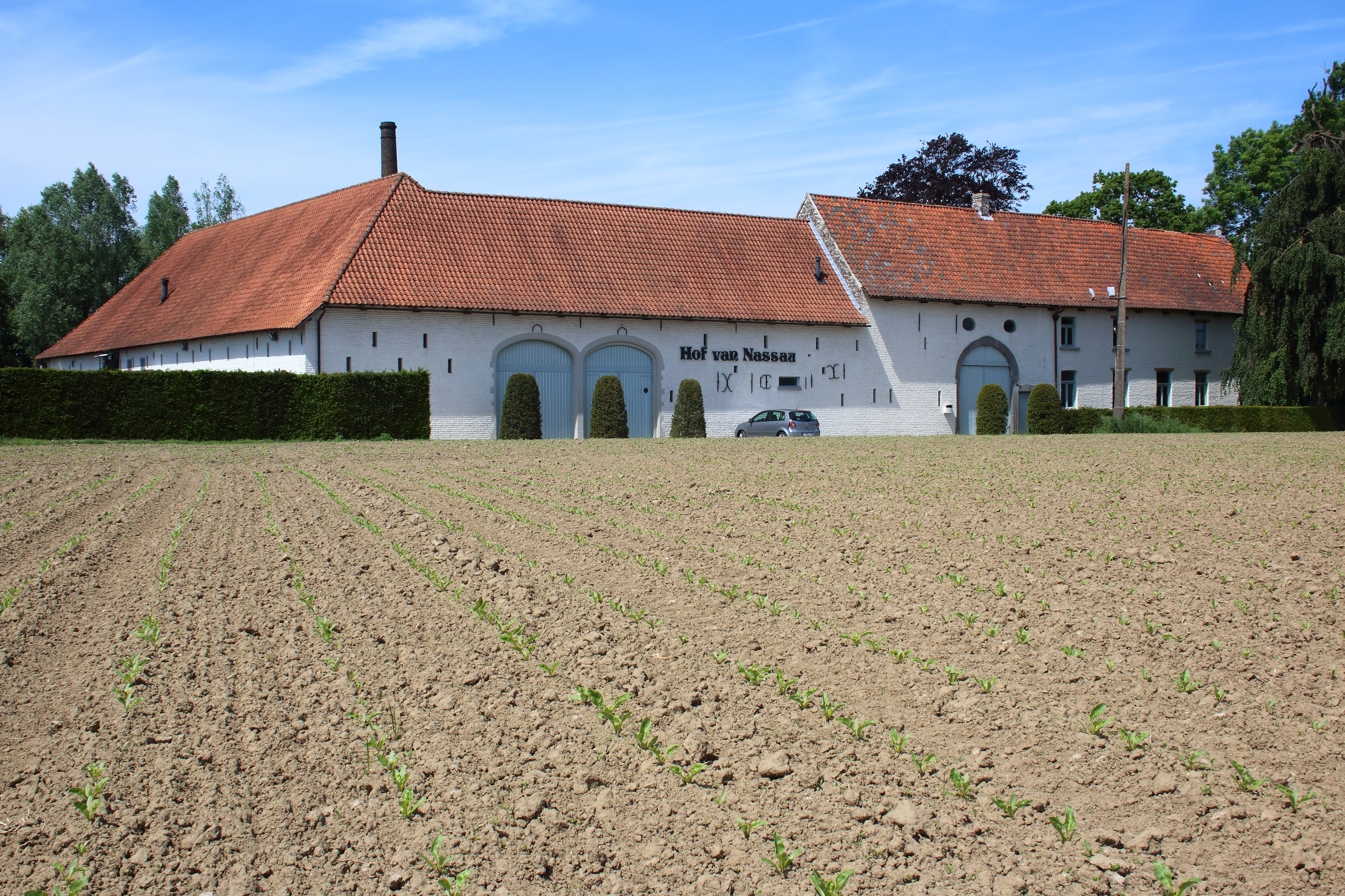 Hof van Oranje, Velzeke-Ruddershove, Zottegem, Vlaanderen, België